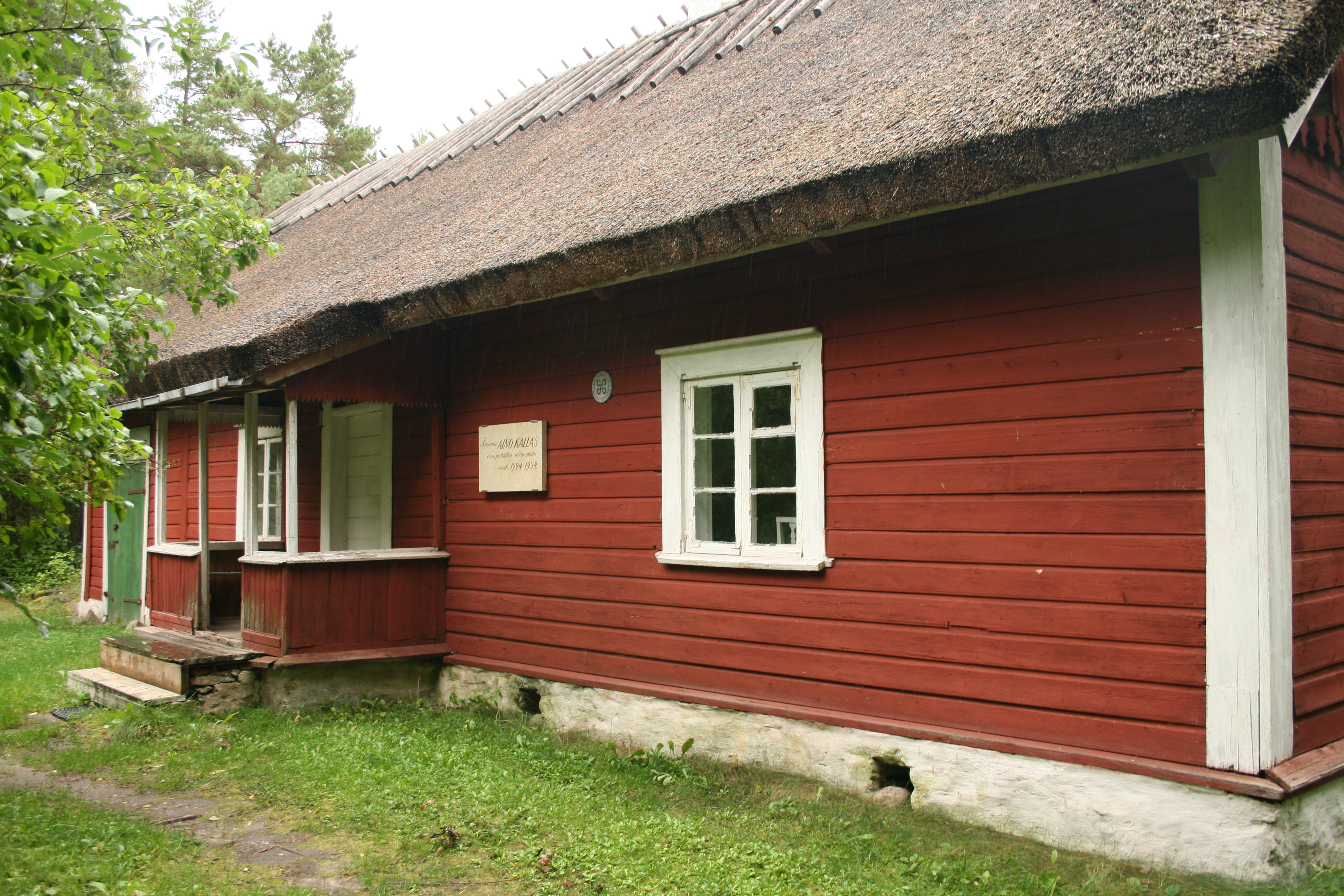 Hiiumaal, Käina vald, Kassari, Taguküla.. Aino Kallase suvemaja.